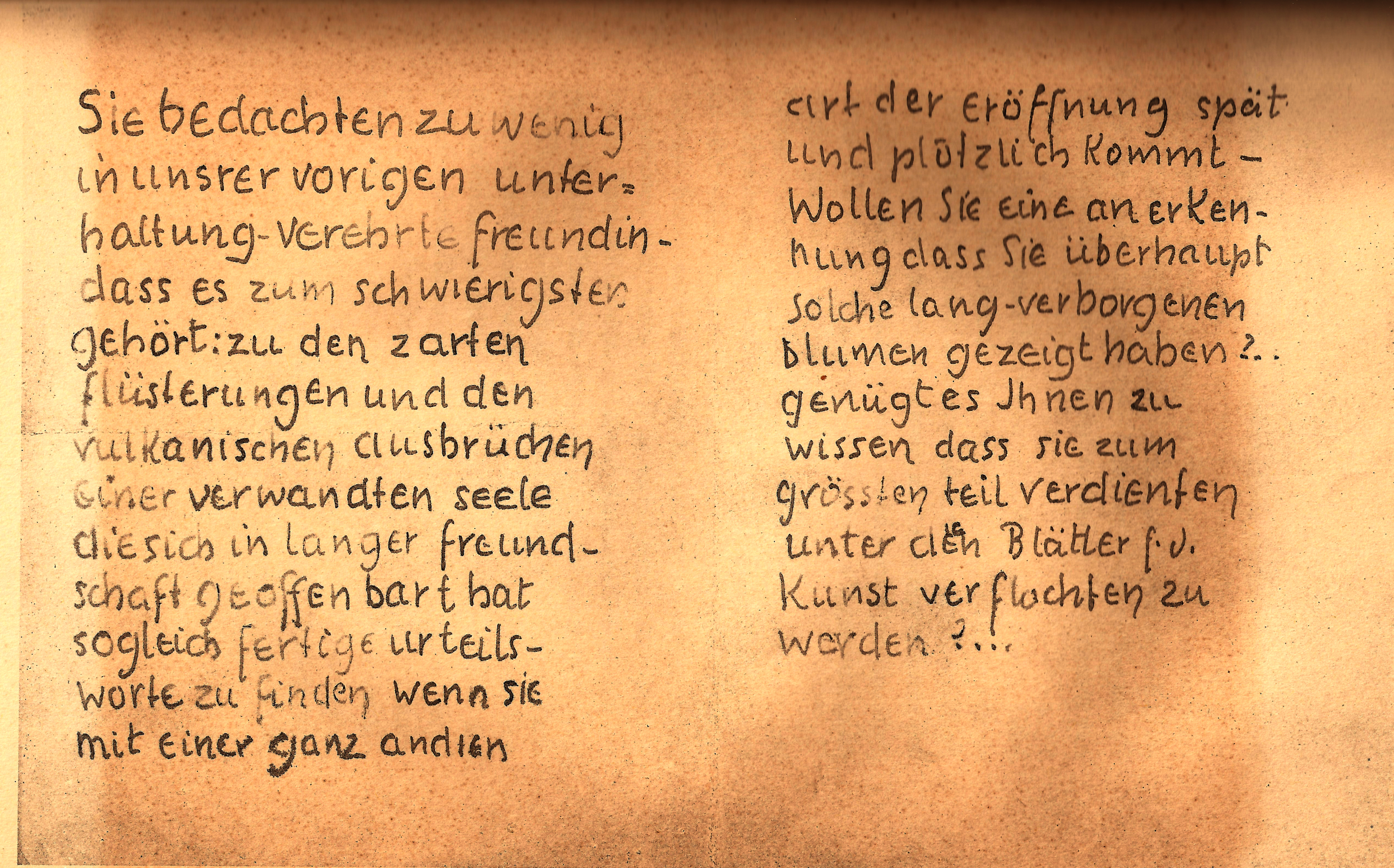 Stefan George in einem Brief an Sabine Lepsius: "Zu den Gedichten an m eine Kinder bemerkte er, daß sie ihn an die Verse einer französischen Dichterin Marceline Desbordes-Valmore erinnerten. Seiner Aufforderung folgend, überließ ich ihm den größten Teil meriner Gedichte, derer mir eine Zeitlang vorenthielt. Auf meinen Wunsch, sie zurückzuerhalten, bekam ich einen mich geglückenden Brief.", S. 50 Grund: Beispiel des Umgangs untereinander im 'Kreis der Blätter für die Kunst' Text - Stefan George an Sabine Lepsius: "Sie bedachten zu wenig in unserer vorigen unterhaltung - verehrte freundin - dass es zum schwierigsten gehört: zu den zarten flüsterungen und den vulkanischen ausbrüchen einer verwandten seele die sich in langer freundschaft geoffenbart hat sogleich fertige urteilsworte zu finden wenn sie mit einer ganz andren art der Eröffnung spät und plötzlich kommt - Wollen Sie eine anerkennung dass Sie überhaupt solche lang-verborgenen blumen gezeigt haben …? genügt es Ihnen zu wissen dass sie zum grössten teil verdienten unter den (die) Blätter f.d. Kunst verflochten zu werden …?